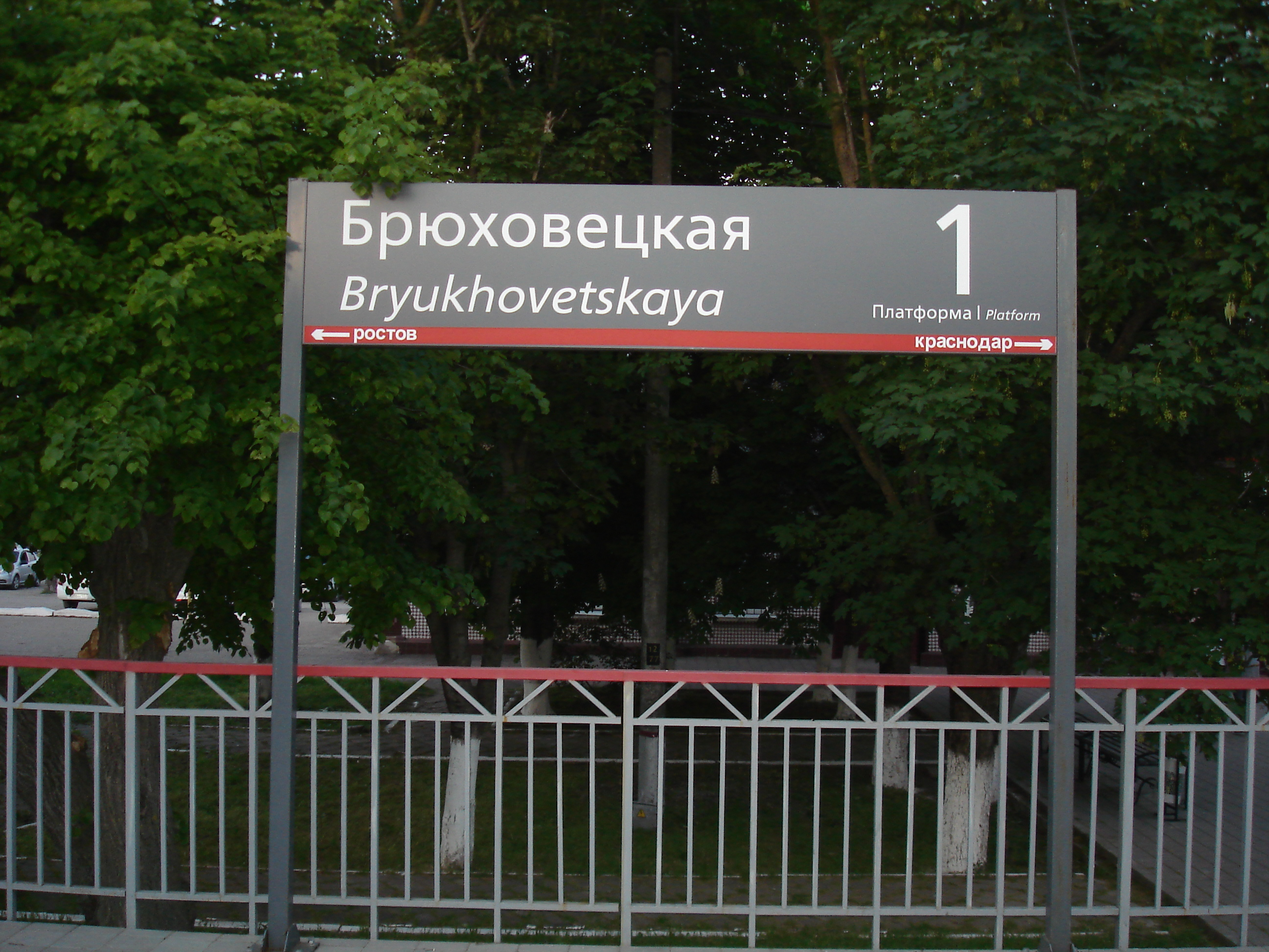 ЖД-станция Брюховецкая